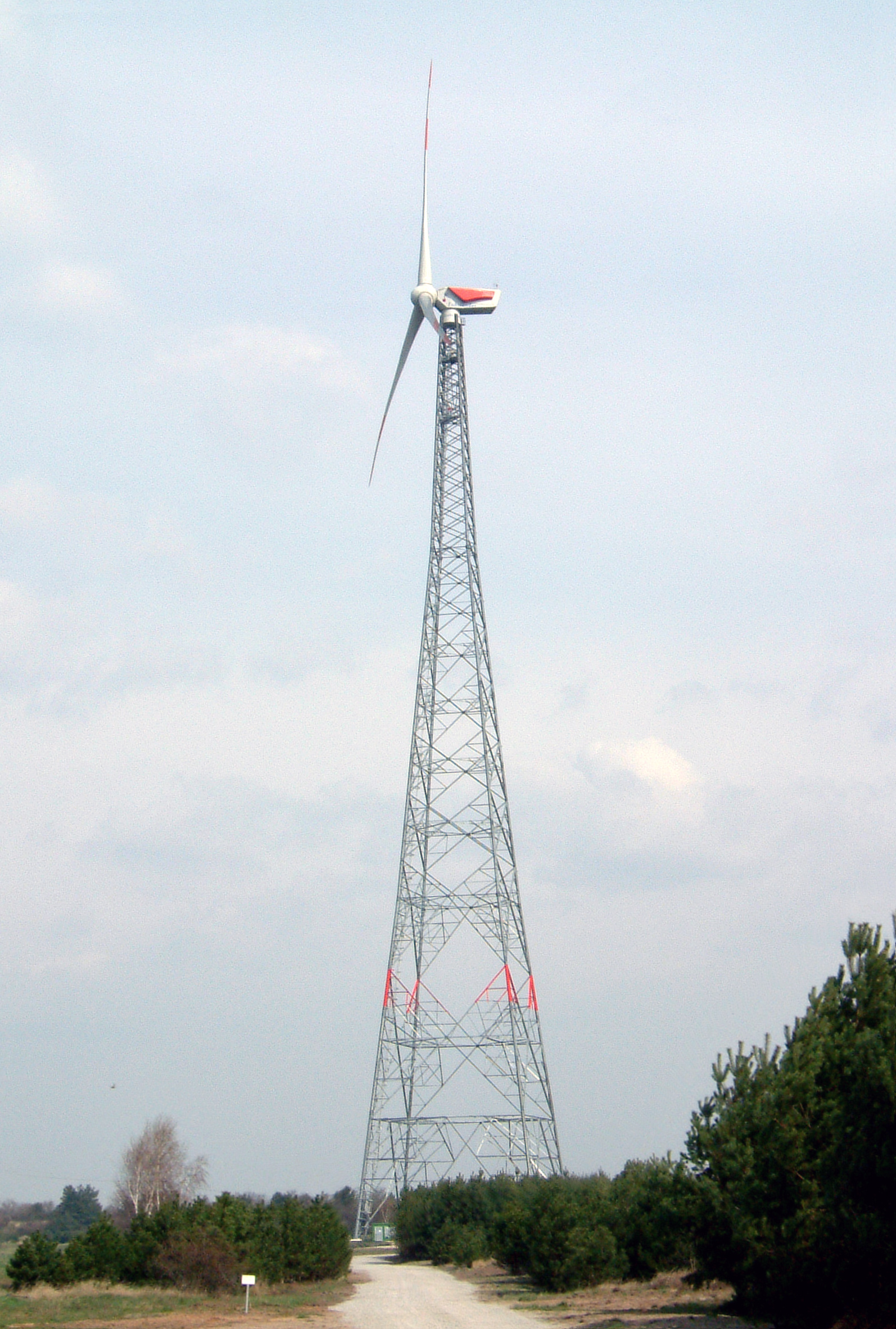 Die zur Zeit höchste Windkraftanlage der Welt (Stand April 2007) in Laasow, Landkreis Oberspreewald Lausitz, Deutschland